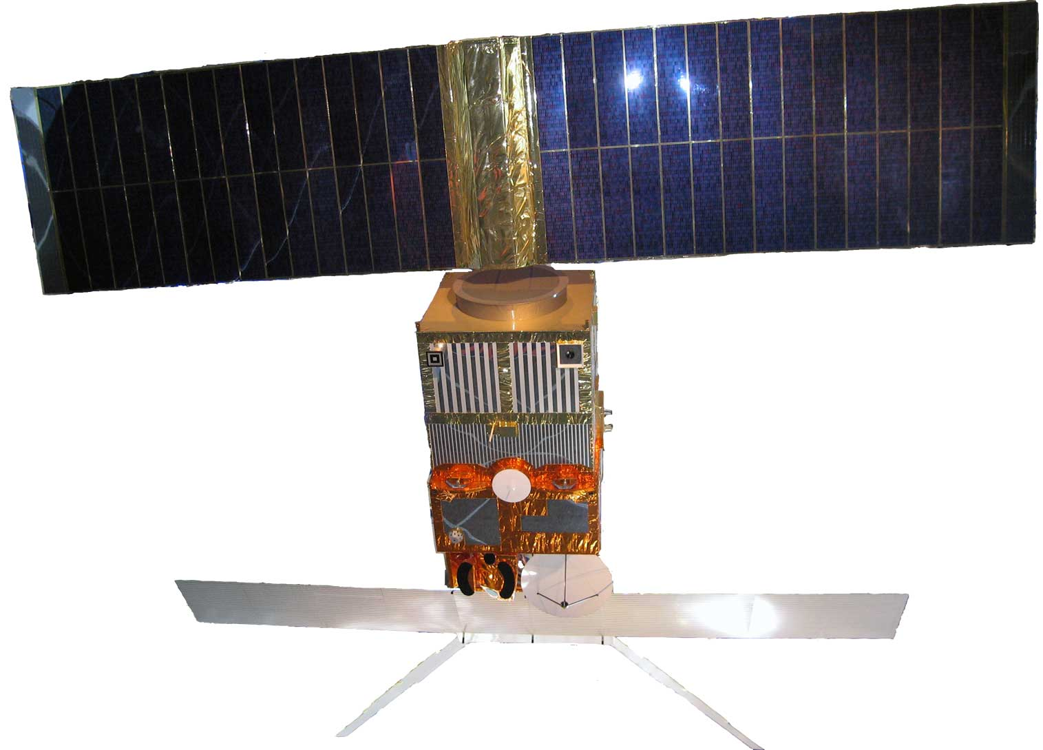 Description : Maquette satellite ERS-1 Place : Musée des Sciences et des Techniques de la Villette, Paris, France Date : Juillet 2006 Auteur : Pline Photo personnelle